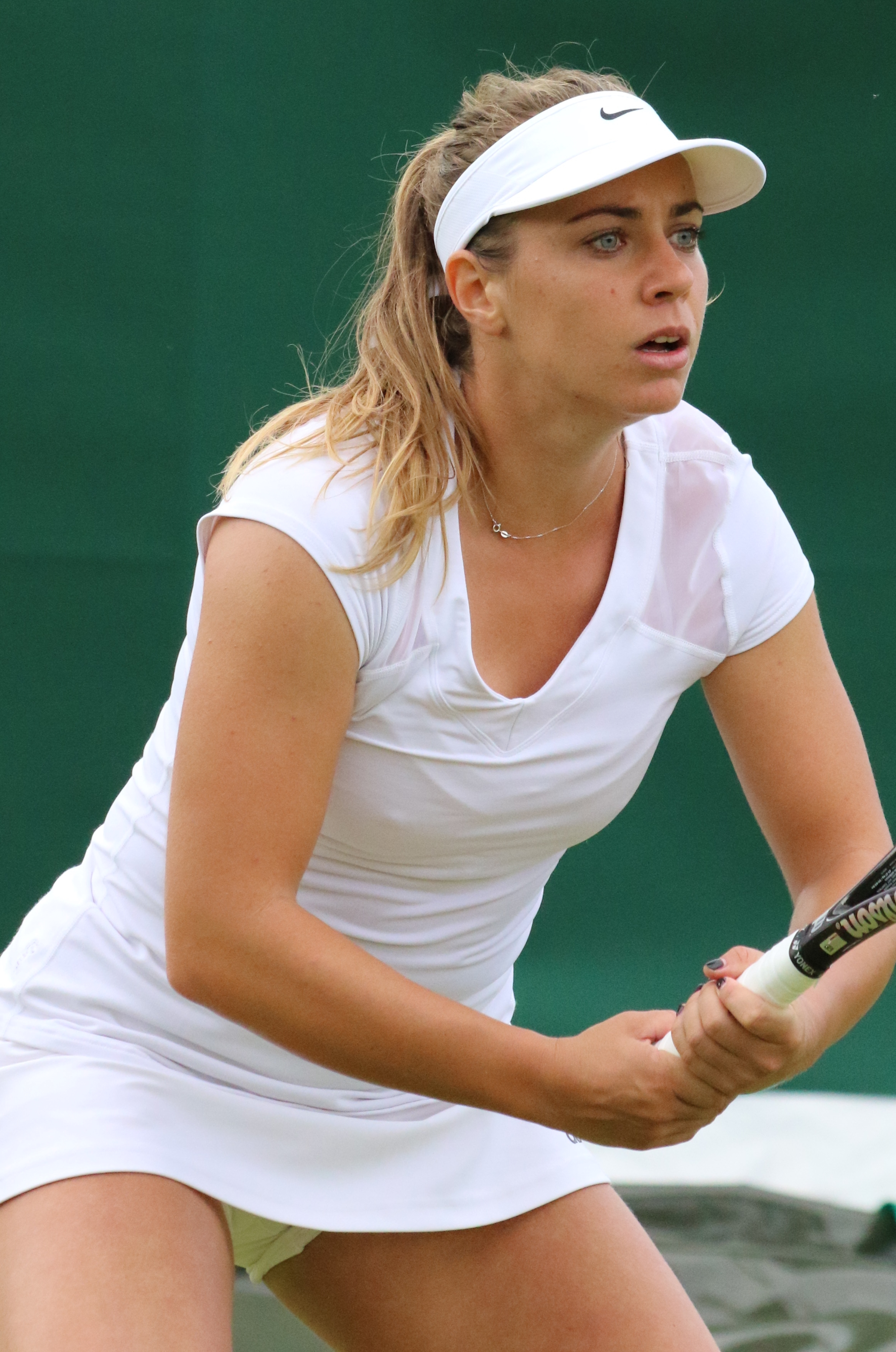 Kristína Kučová WMQ16 (1)